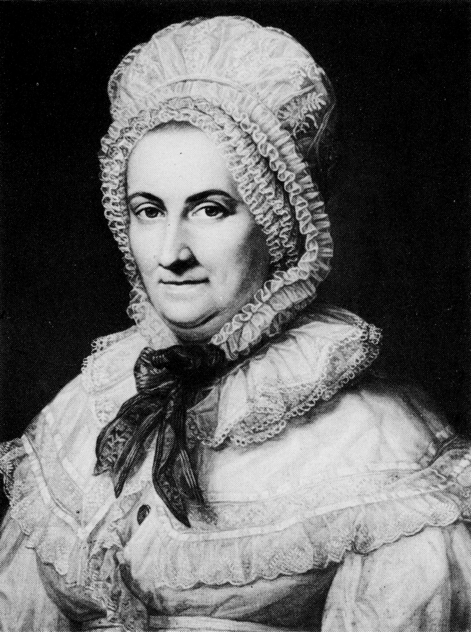 Bildnis der Margarethe Elisabeth Jenisch (1763-1832). Zeitgenössisches Porträt eines unbekannten Künstlers.